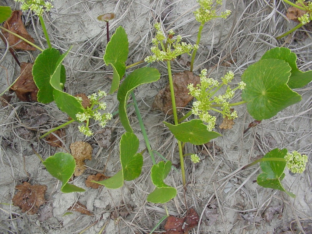 Hydrocotyle bonariensis - APIACEAE - Praia da Joaquina - Florian�polis - SC Brasil.